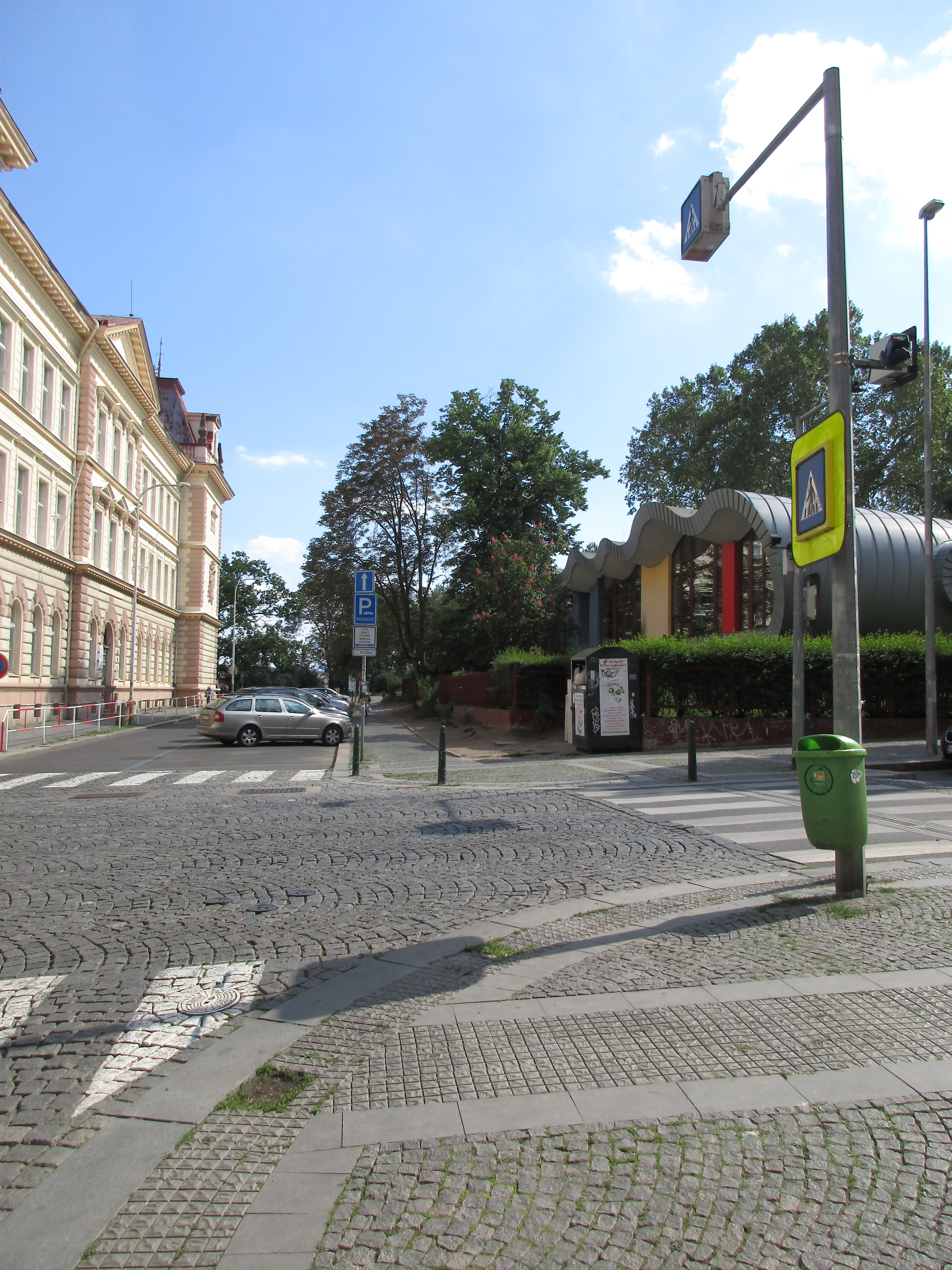 Lípa republiky. Praha 7 - Holešovice, ulice Františka Křížka. Vysazena roku 1968 na památku 50. výročí vzniku Československé republiky.